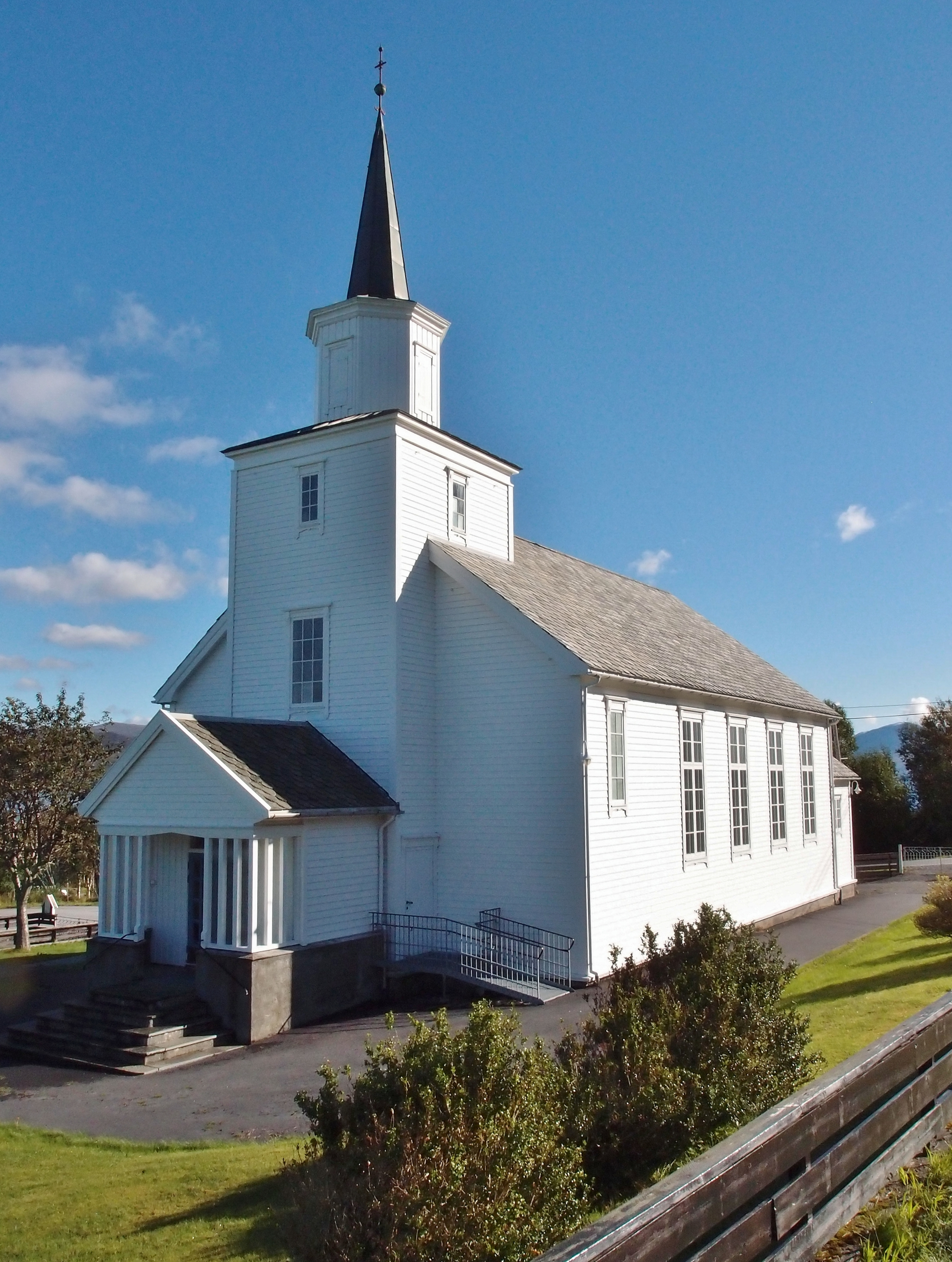 Åram kyrkje er ei tømra langkyrkje bygd i 1927 med 300 sitjeplassar. Arkitekt og byggmeister var Sivert Storegjerde. Kjelde: Kulturnett Møre og Romsdal.